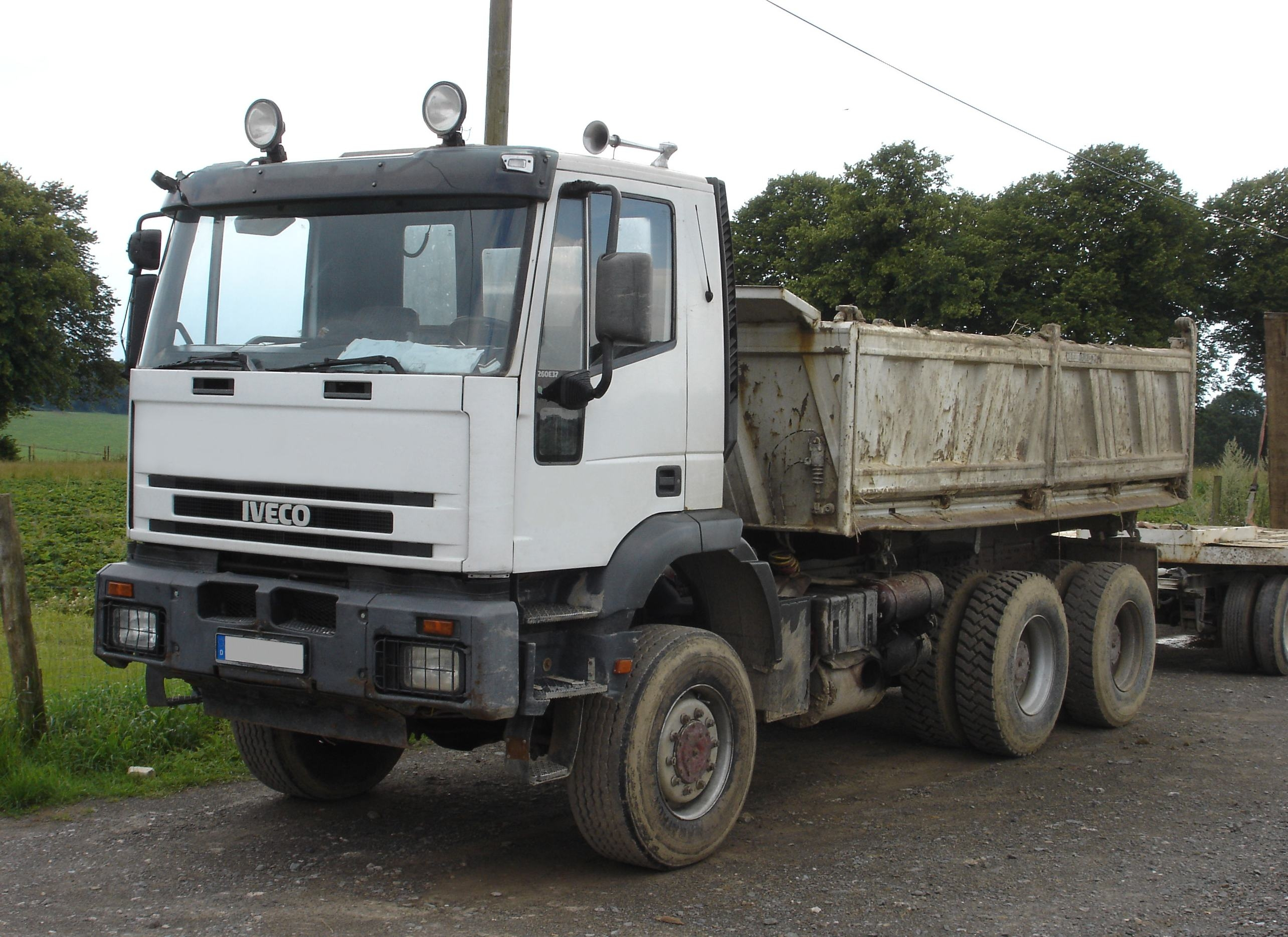 IVECO Euro-Trakker Pritschenkipper